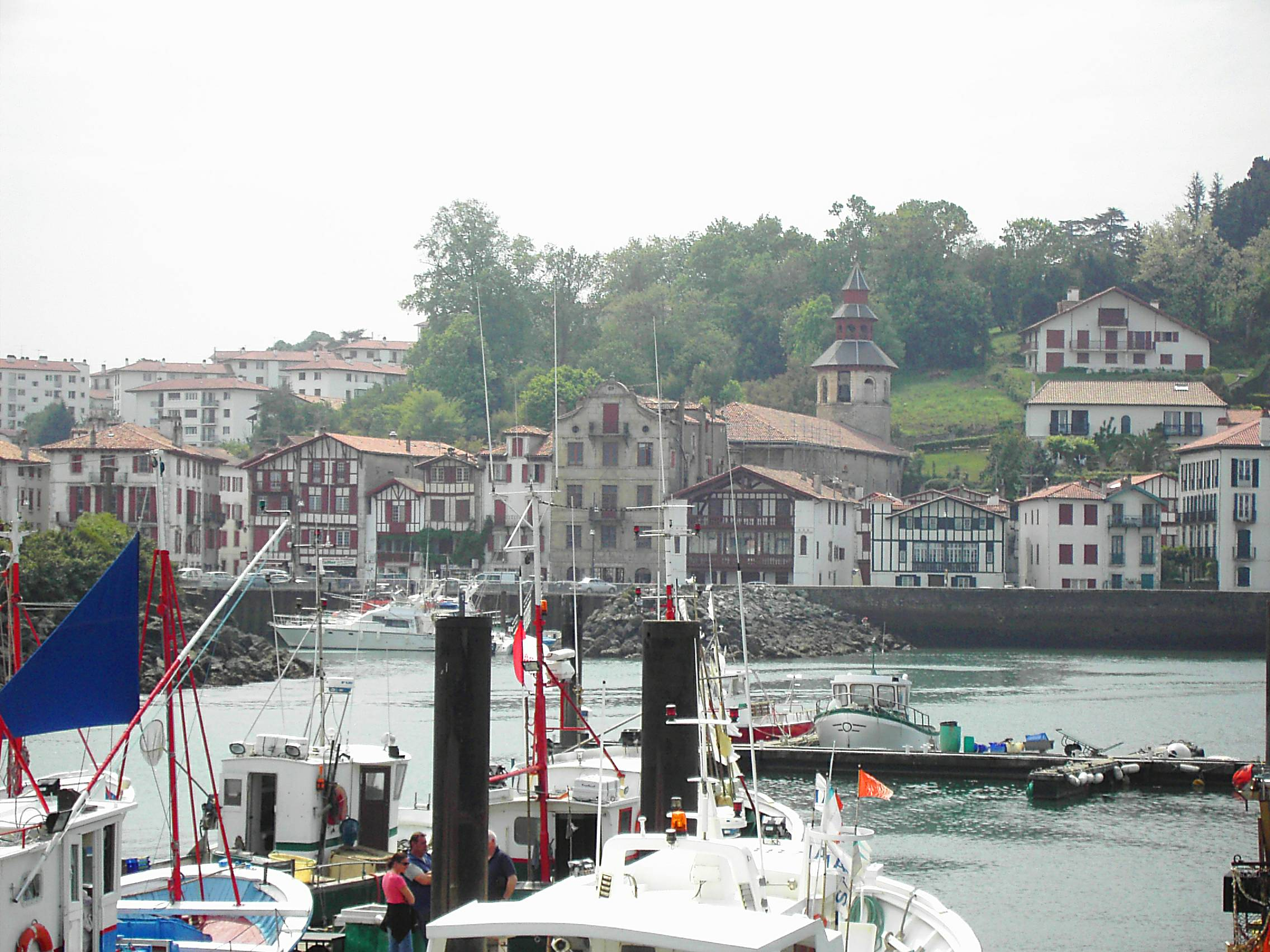 Ciboure, l'église Saint-Vincent vue du port de St Jean de Luz le 05/04/06 par Harrieta171